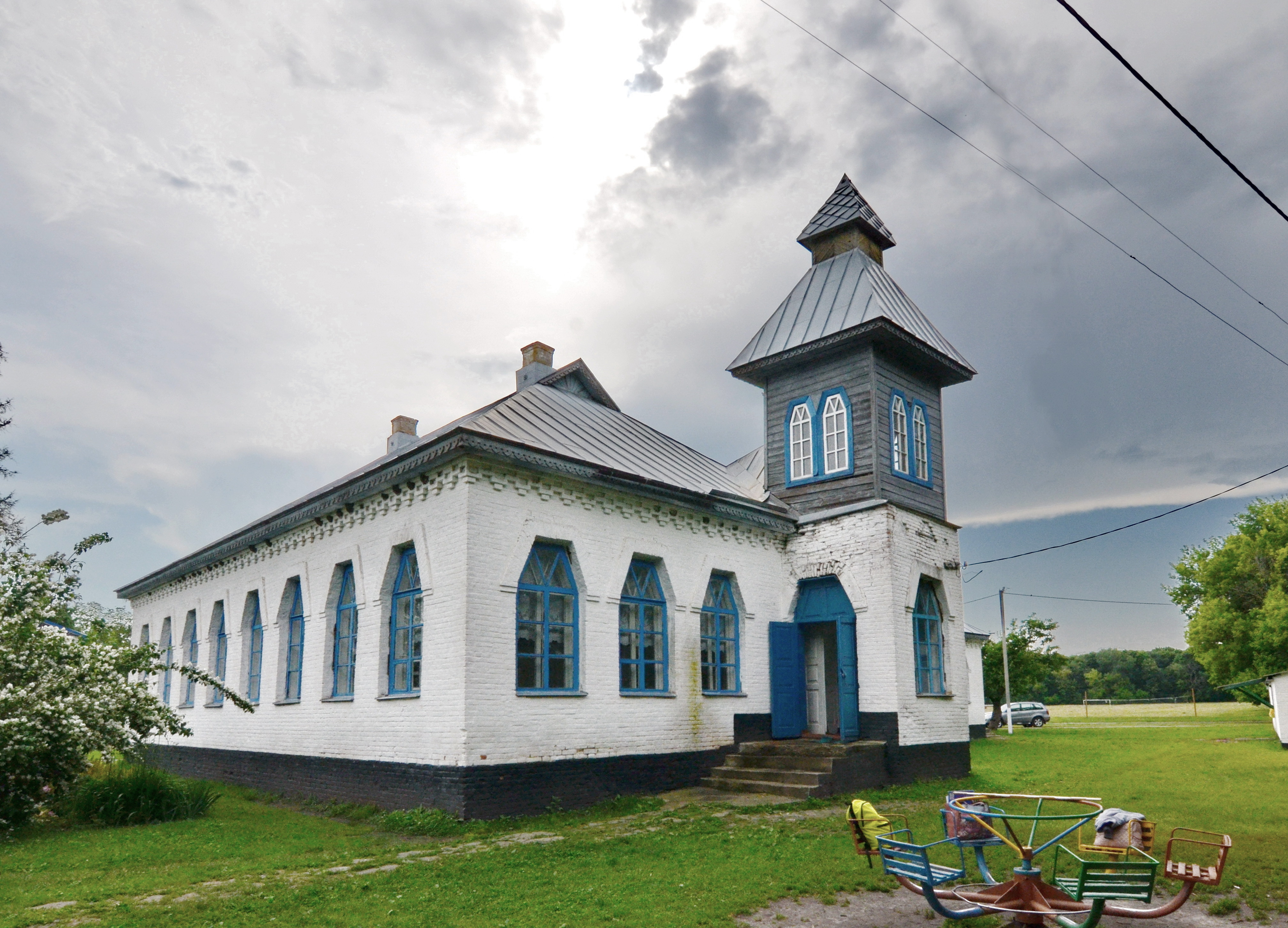 Школа земська двокомплектна, село Гільці, вул. Шкільна, 1. Школа - пам'ятка українського архітектурного модерну (УАМ). Збудована за проектом Опанаса Сластіона. Будівля отримала охоронний статус 26.08.2016 року, завдяки роботі гуманітарного проекту "Школи Лохвицького земства" (на чолі з Ольгою Герасим'юк). Облікову документацію виконали фахівці ТОВ "Майстерня архітектора І.Бикова".